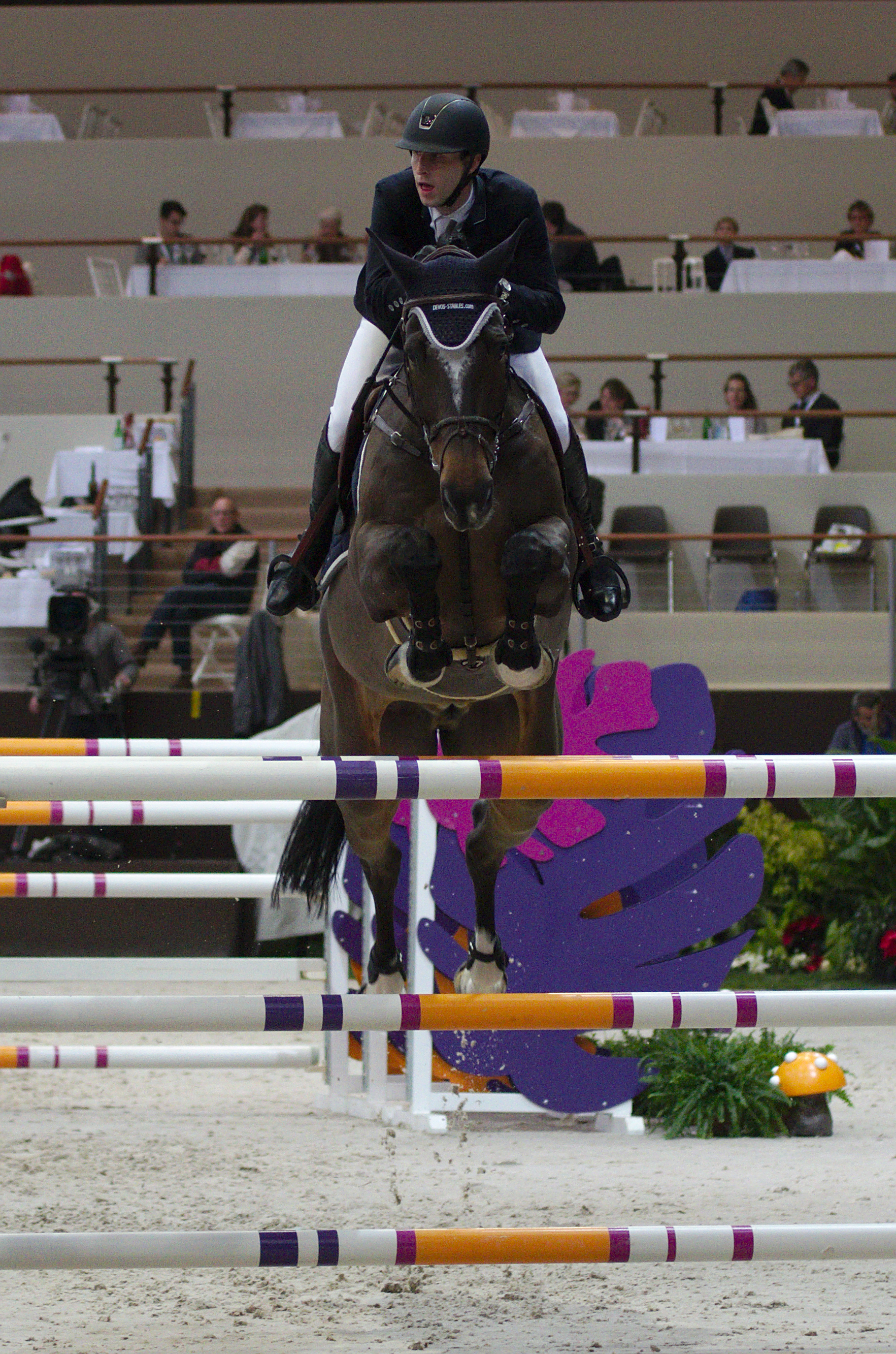 54eme CHI de Genève - 20141213 - Coupe de Genève - Pieter Devos et Dream of India Greenfield